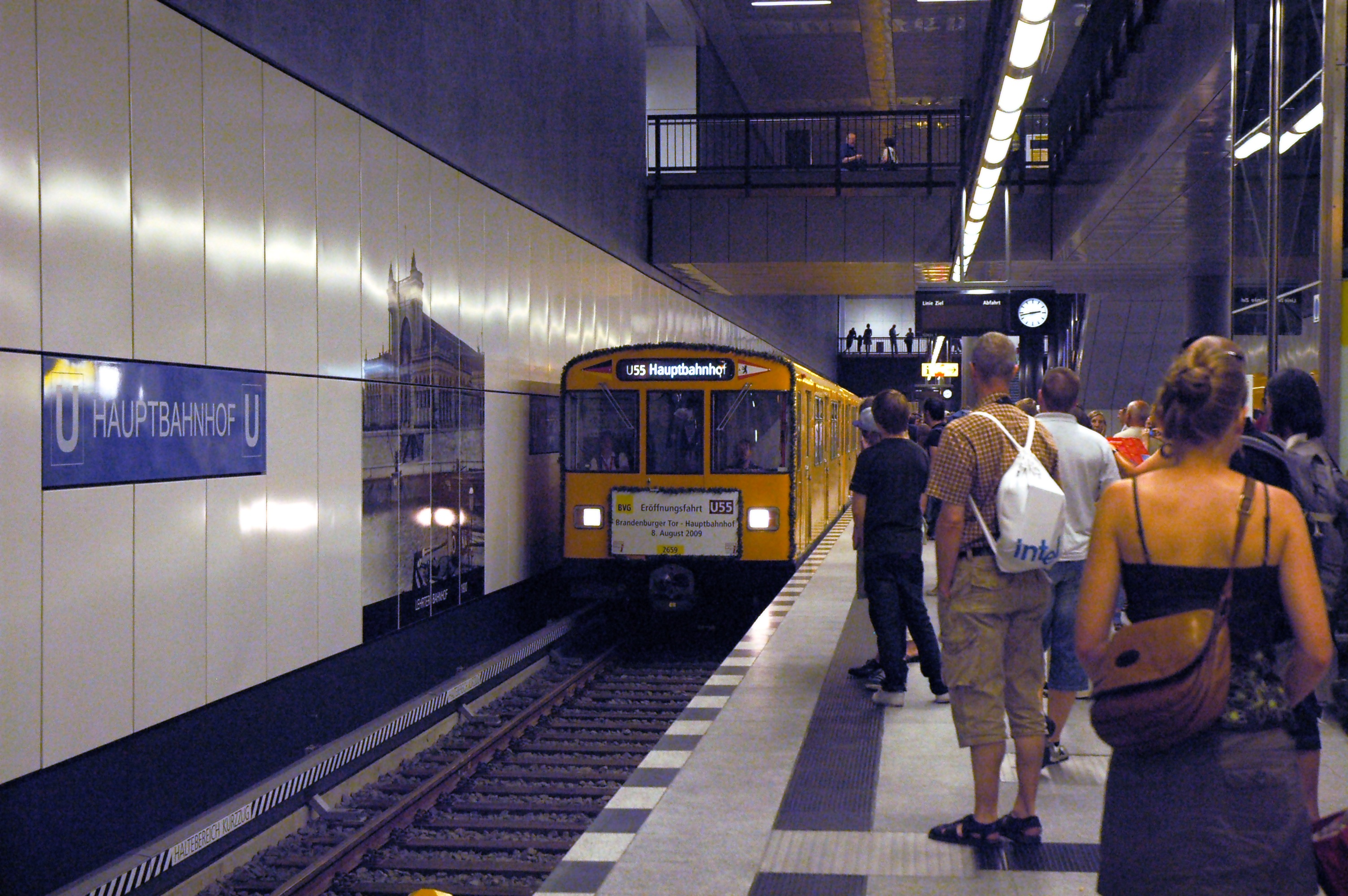 Eröffnung der U-Bahnlinie 55 in Berlin am 8. August 2009